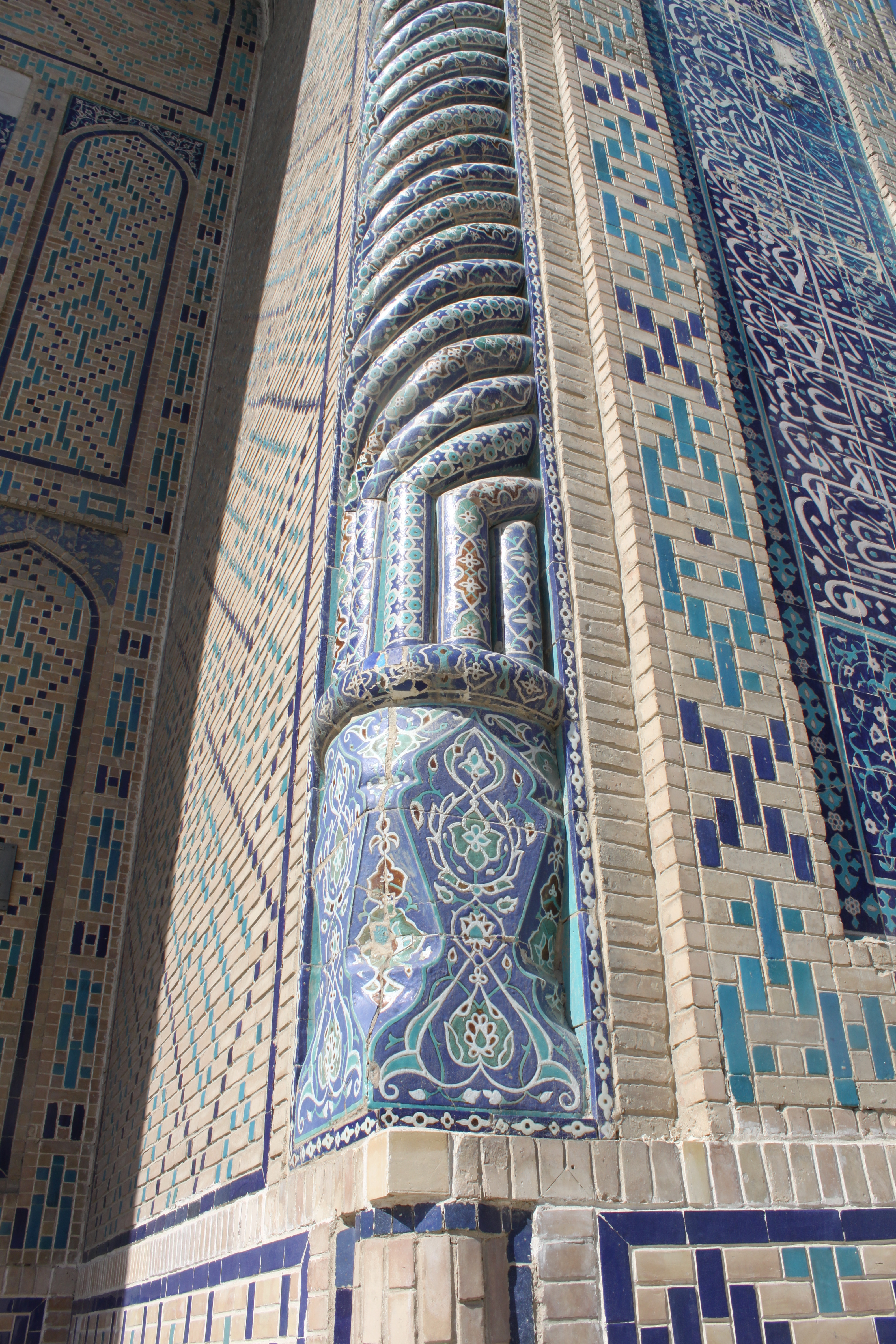 Détail du portail d'entrée de la madrasa Ulugh Beg